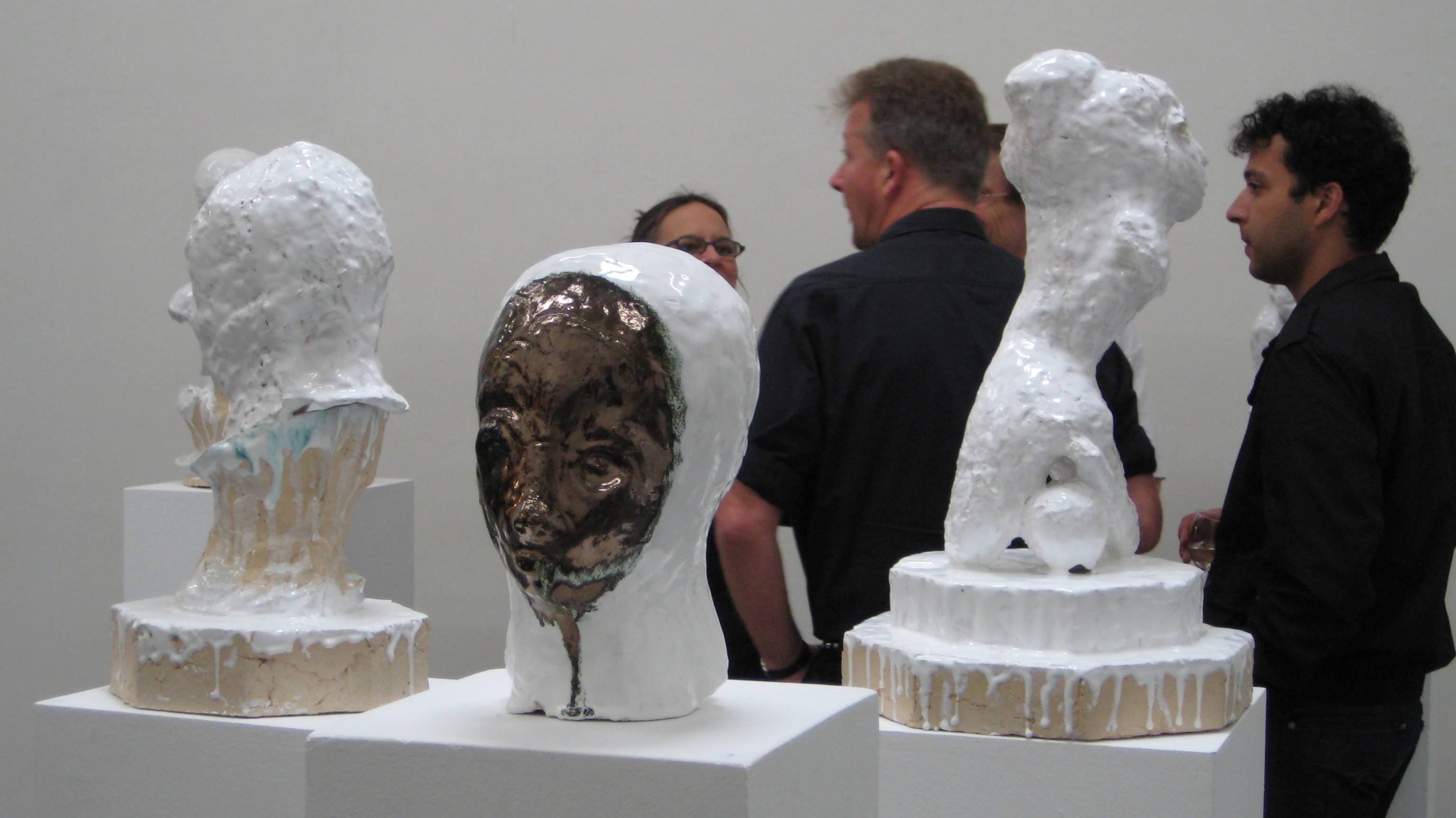 Exposition Johan_Tahon